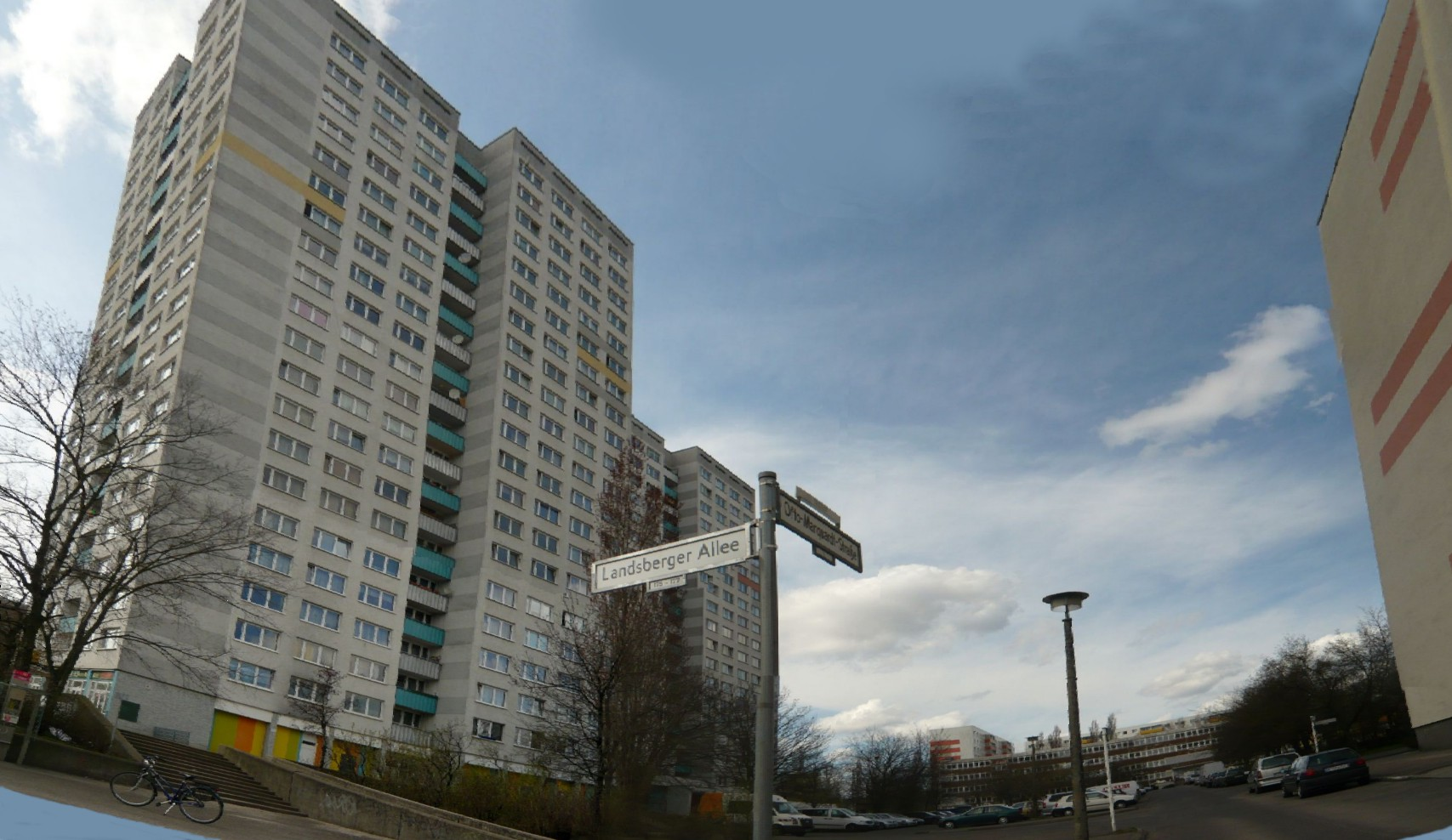 Berlin-Fennpfuhl, Otto-Marquard-Straße